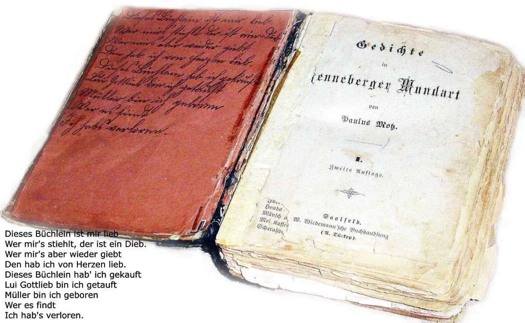 "Motzebuechle" - Mundartbuch von Paulus Motz